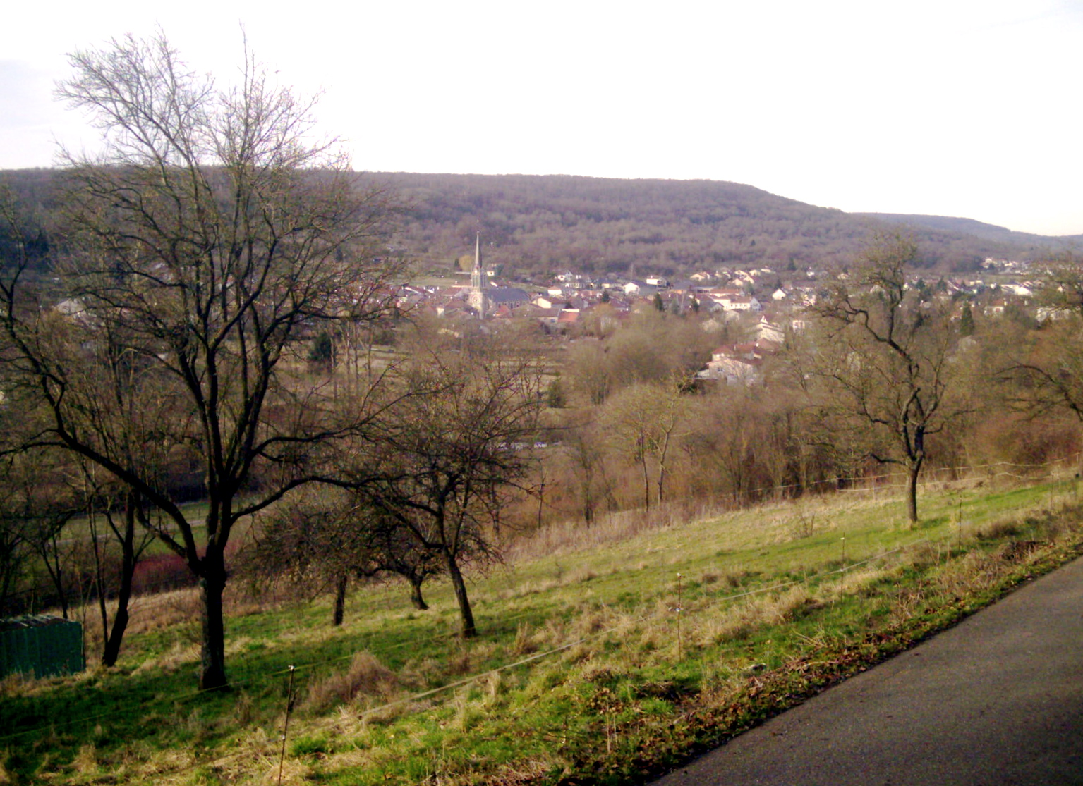 Jezainville